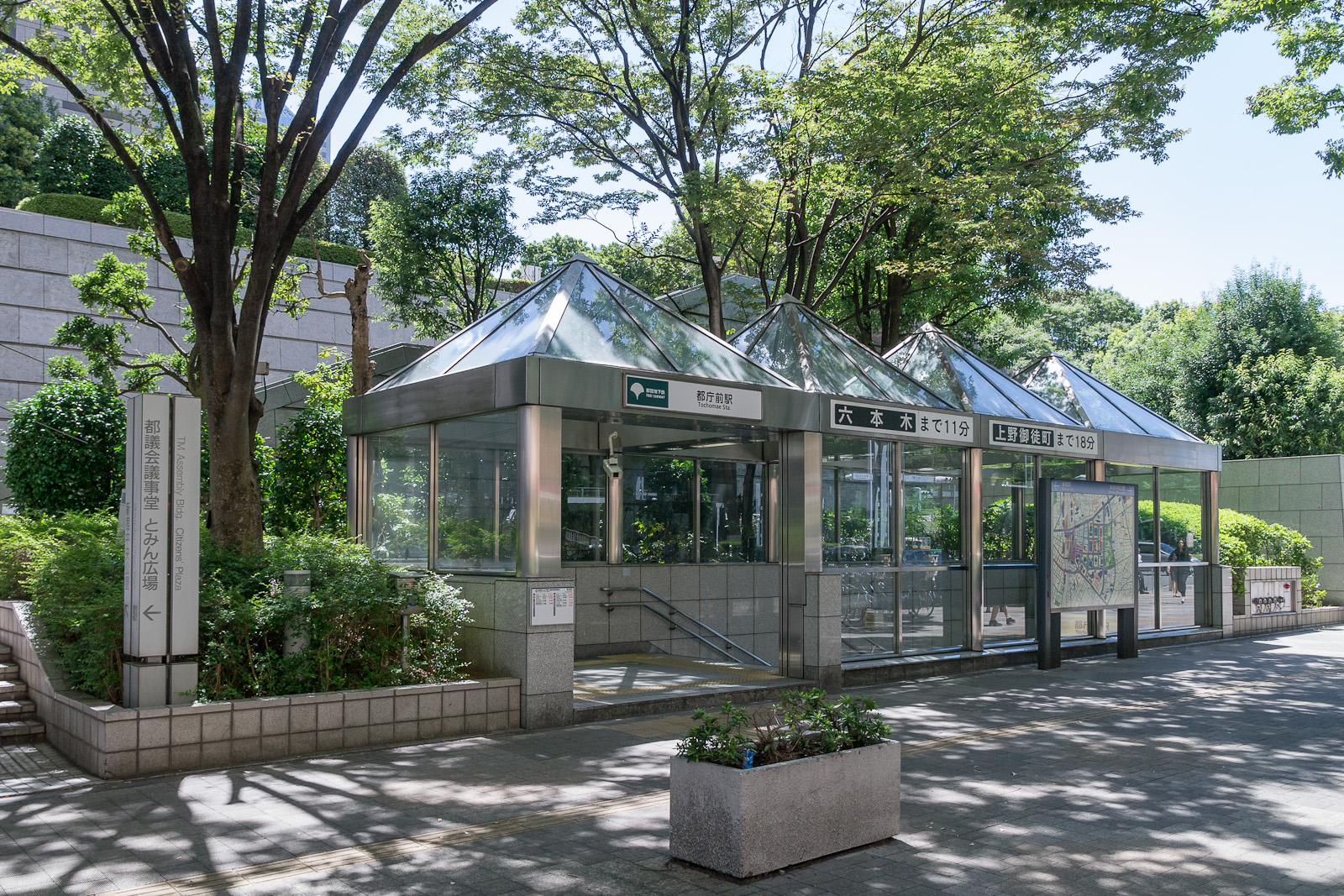 都営大江戸線都庁前駅。